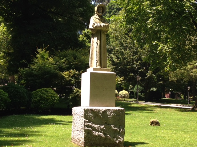 Monje franciscano en el parque de Oviedo